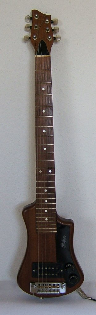 E-Gitarre Höfner Shorty